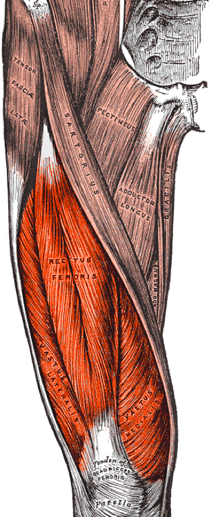 Musculus quadriceps femoris, colorized